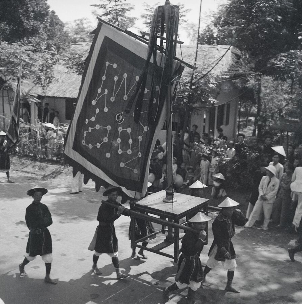 Lễ tế Giao năm 1942.